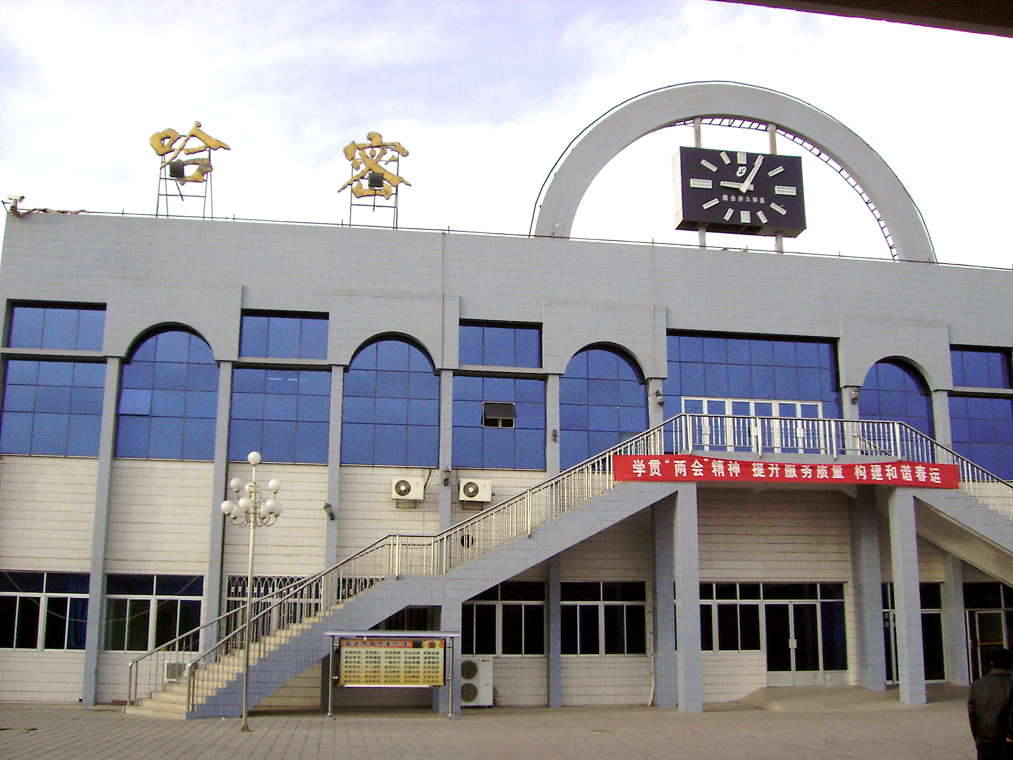 哈密火车站内景